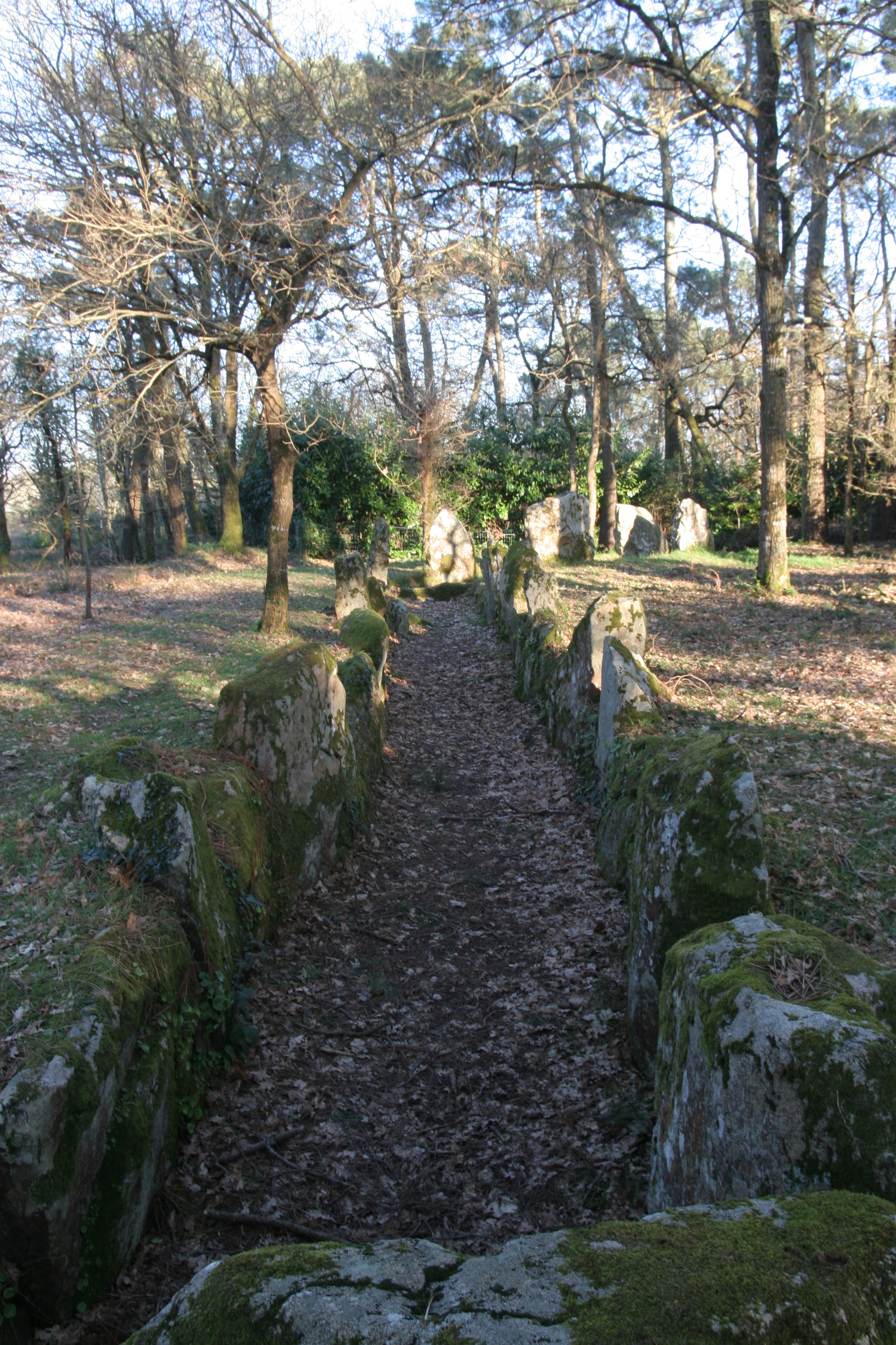 Allée couverte de Luffang à Crach.